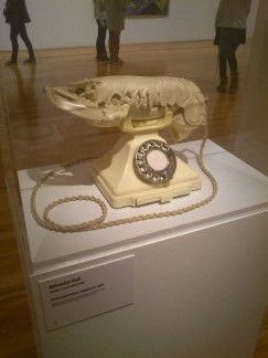 Obra ubicada en el museo Berardo de Arte Contemporáneo (Lisboa)